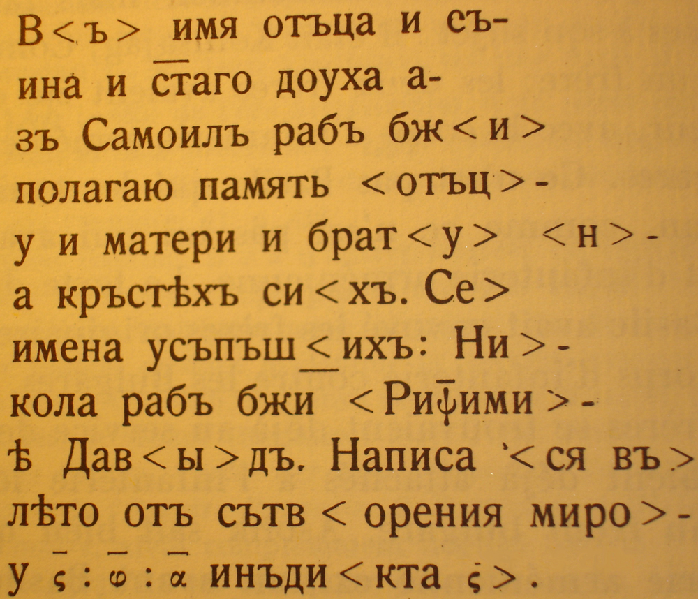 Inscripción funeraria del zar búlgaro Samuel. Imágen modificada: recortada, reducida, sin la fecha incorporada por la cámara